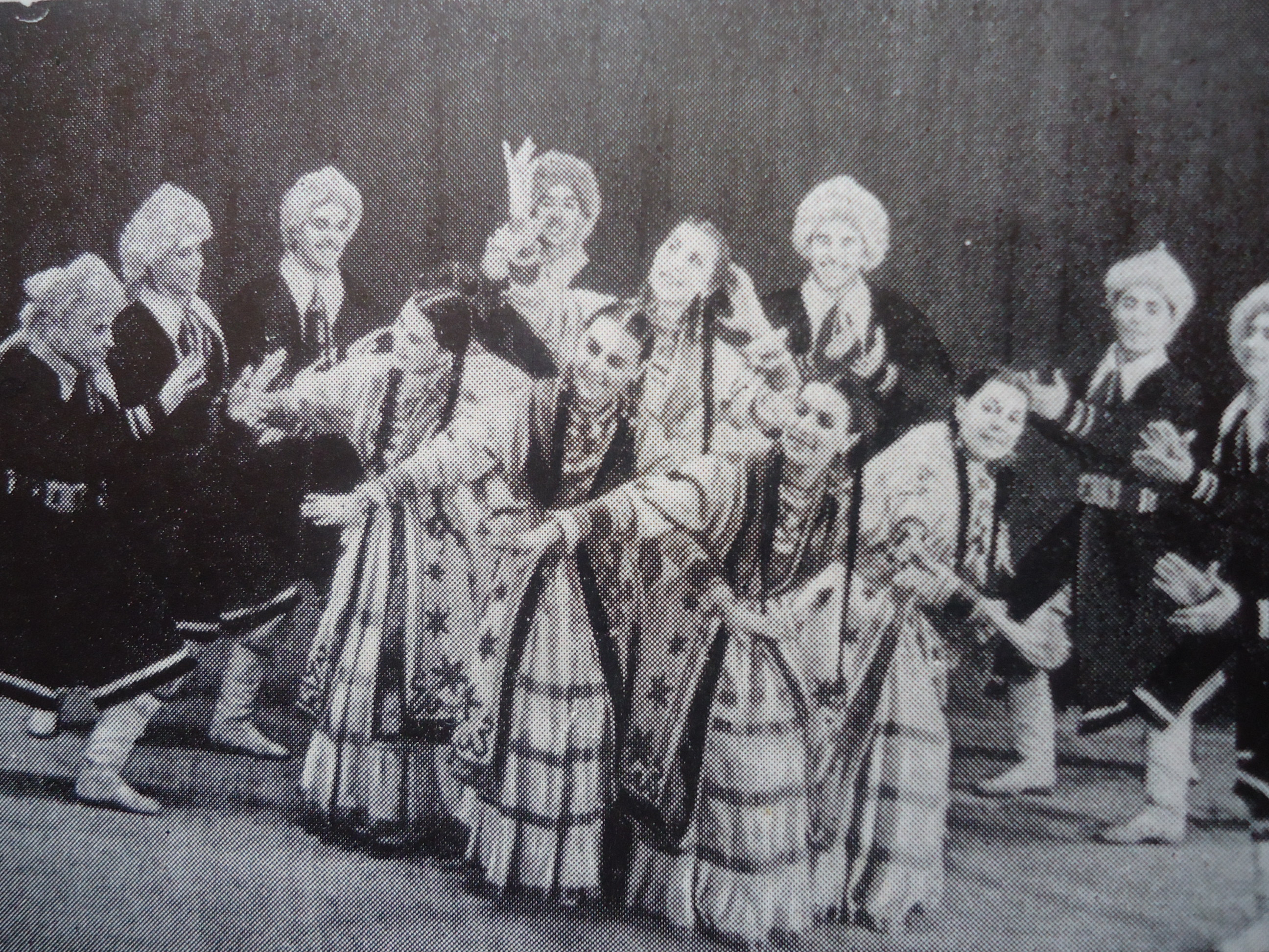 Башҡортса: Башҡорт АССР-ының Дәүләт халыҡ бейеүҙәре ансамбле башҡарыуында "Гөлнәзирә" бейеүе.